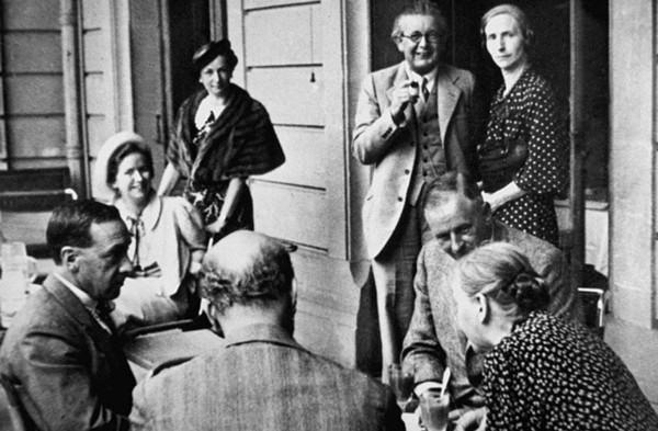 Valentine et Jean Piaget lors d’une conférence du Bureau international d’éducation en 1932.